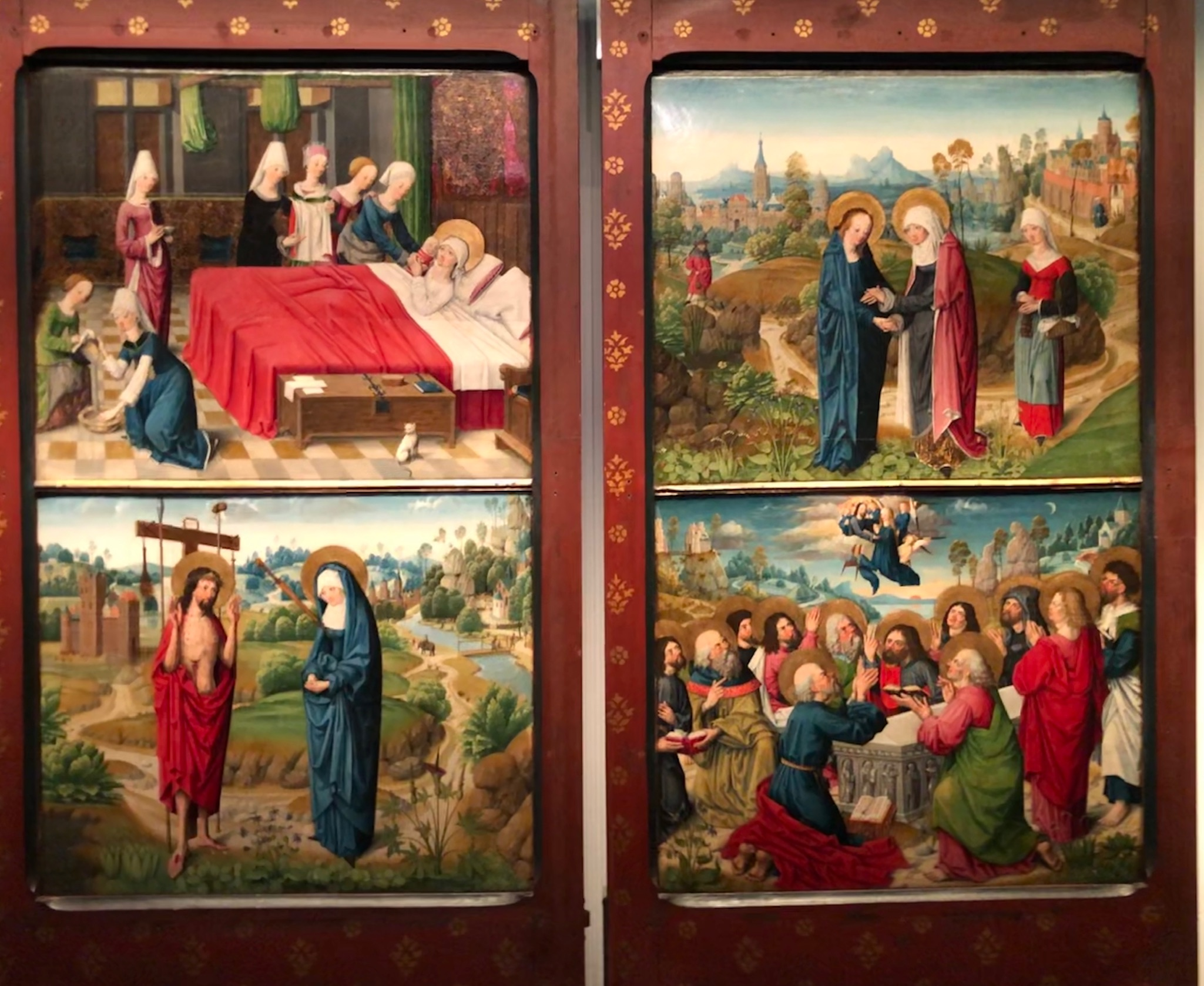 Linker Flügel des Marienaltars im Aachener Domschatz